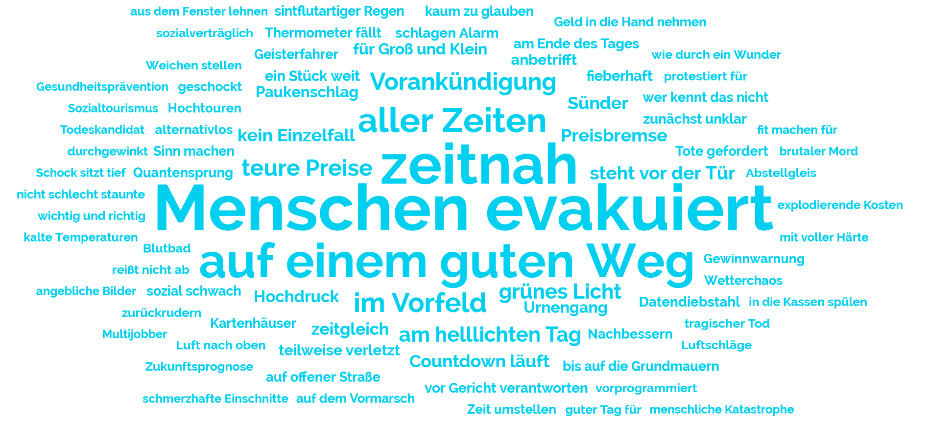 Floskelwolke